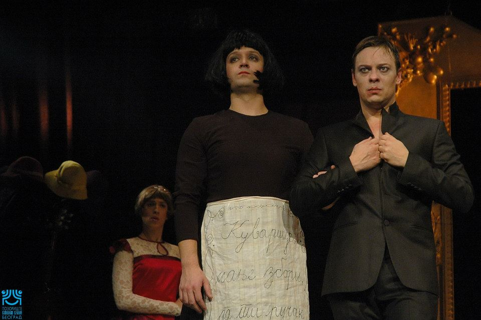 Српски (ћирилица): Сцене са премијере позоришне представе "Госпођа Министарка" у извођењу ансамбла позоришта Бошко Буха. На слици Горан Јевтић и Немања Оливерић.